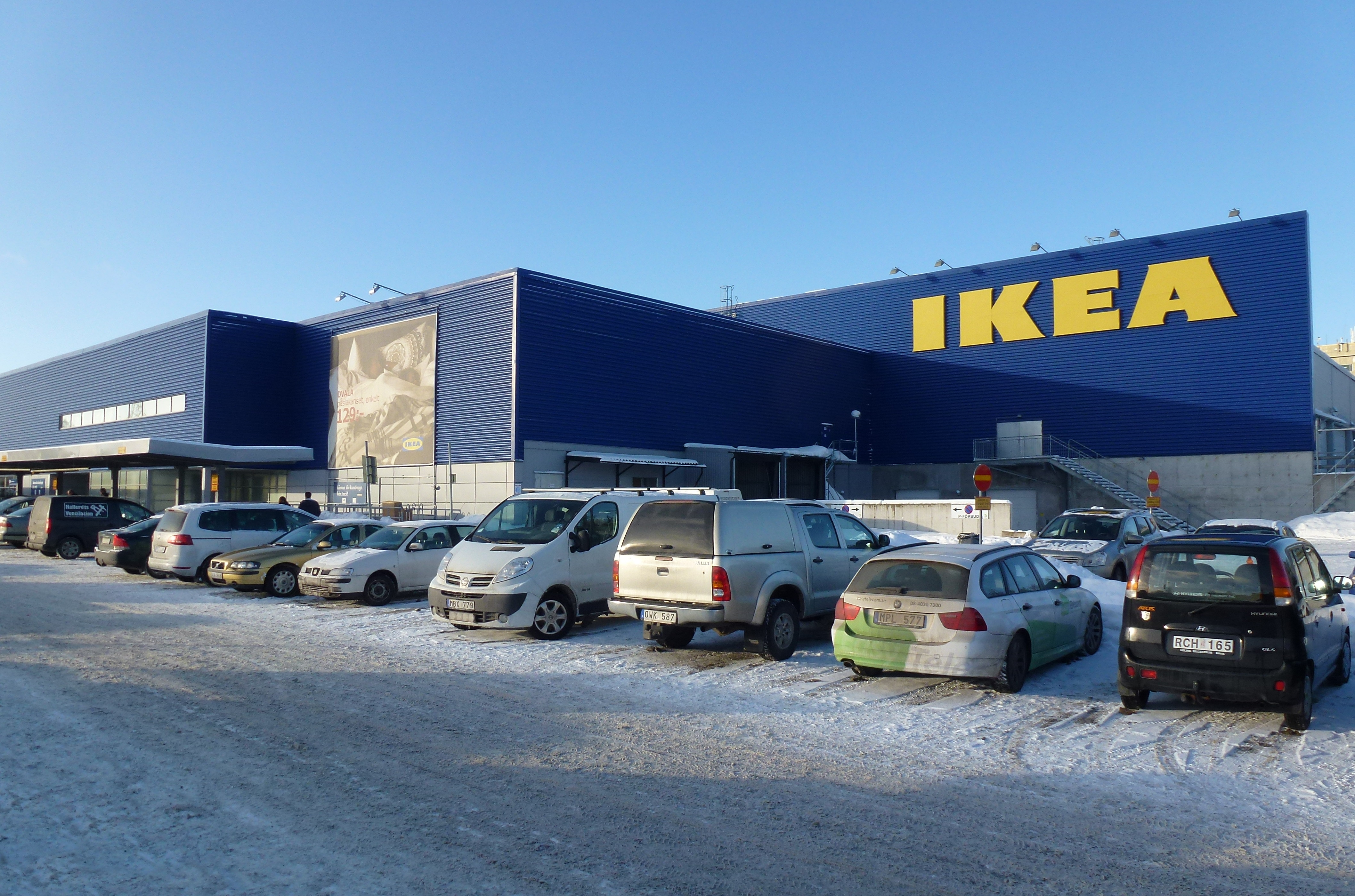 IKEA Kungens kurva januari 2013